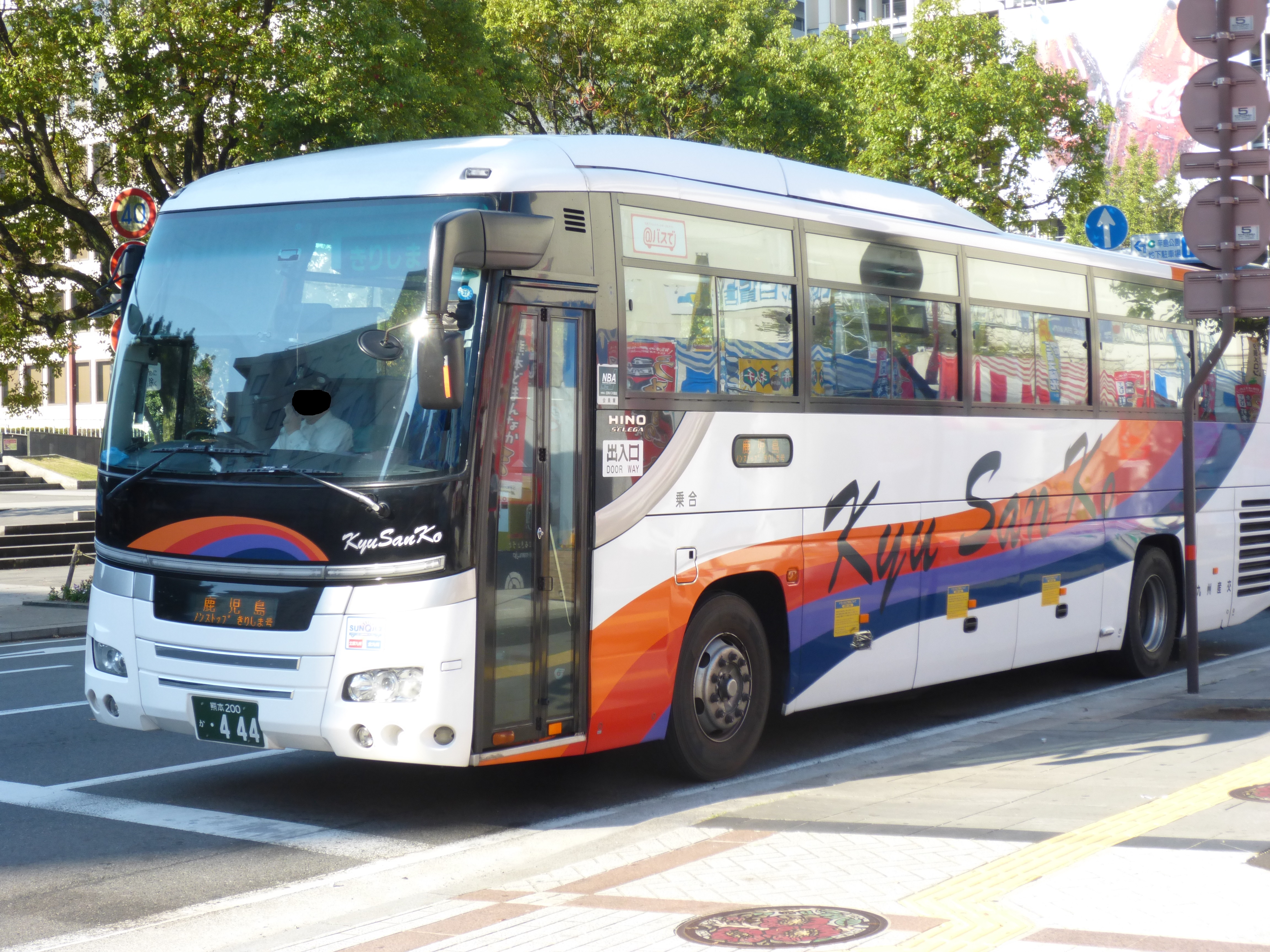 "kirishima gō" kumamoto to kagoshima